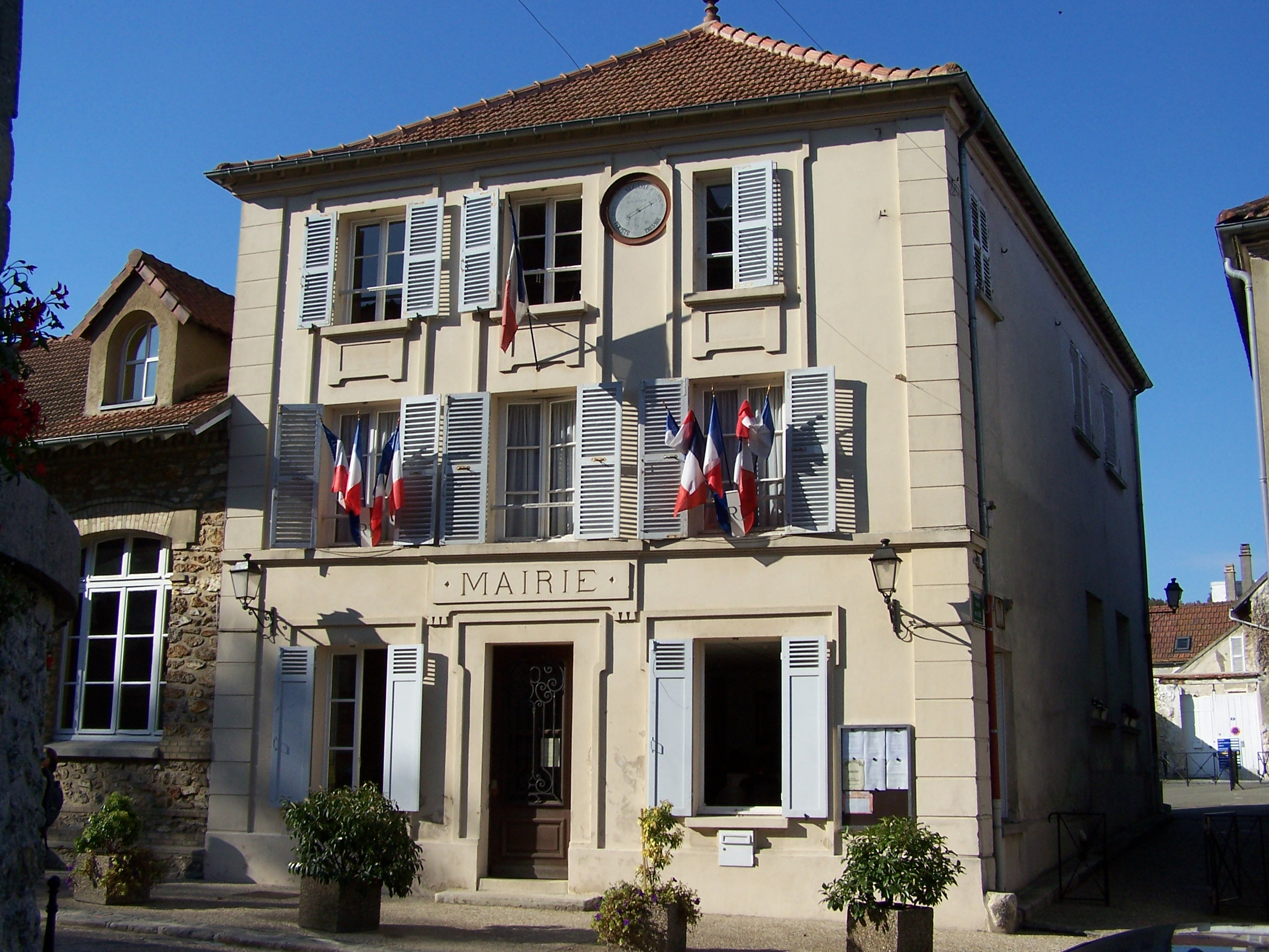 Mairie d'Évecquemont (Yvelines, France)